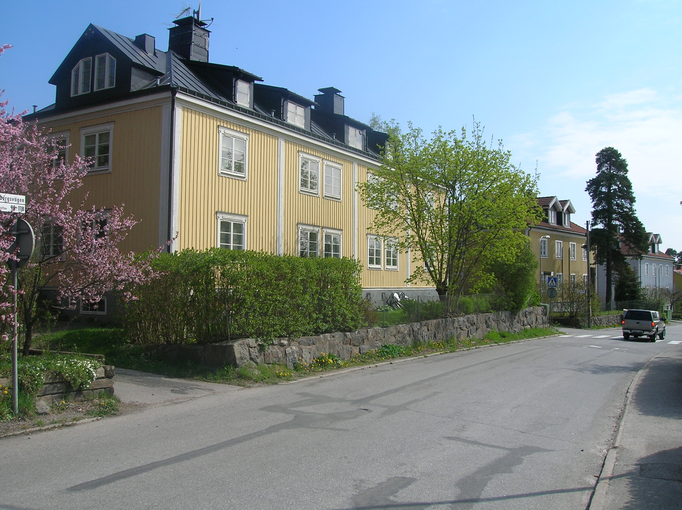 Flerfamiljshus uppförda ca 1920, Lisebergsvägen 125, Liseberg, Stockholm